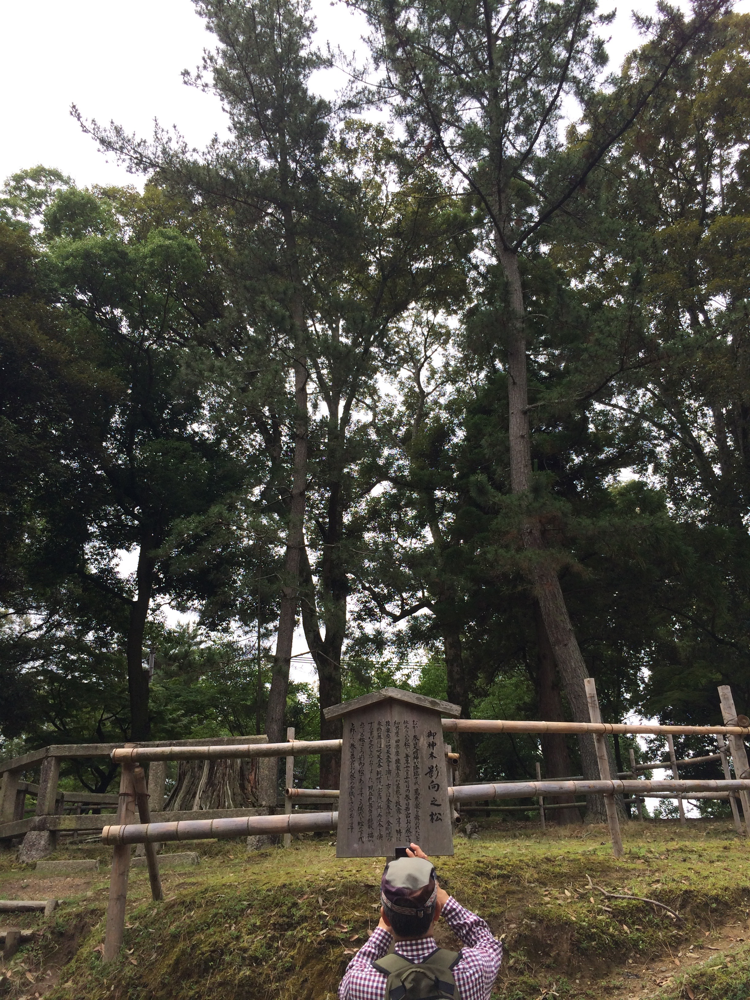 影向之松、奈良公園